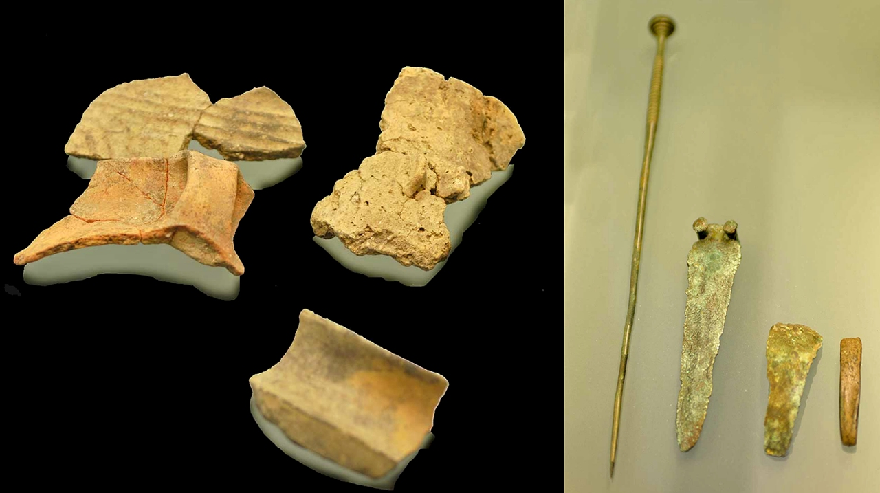 Fundstücke vom Kastel (bronzezeitliche Höhensiedlung Zeneggen) ausgestellt im Naturhistorischen Museum in Sion